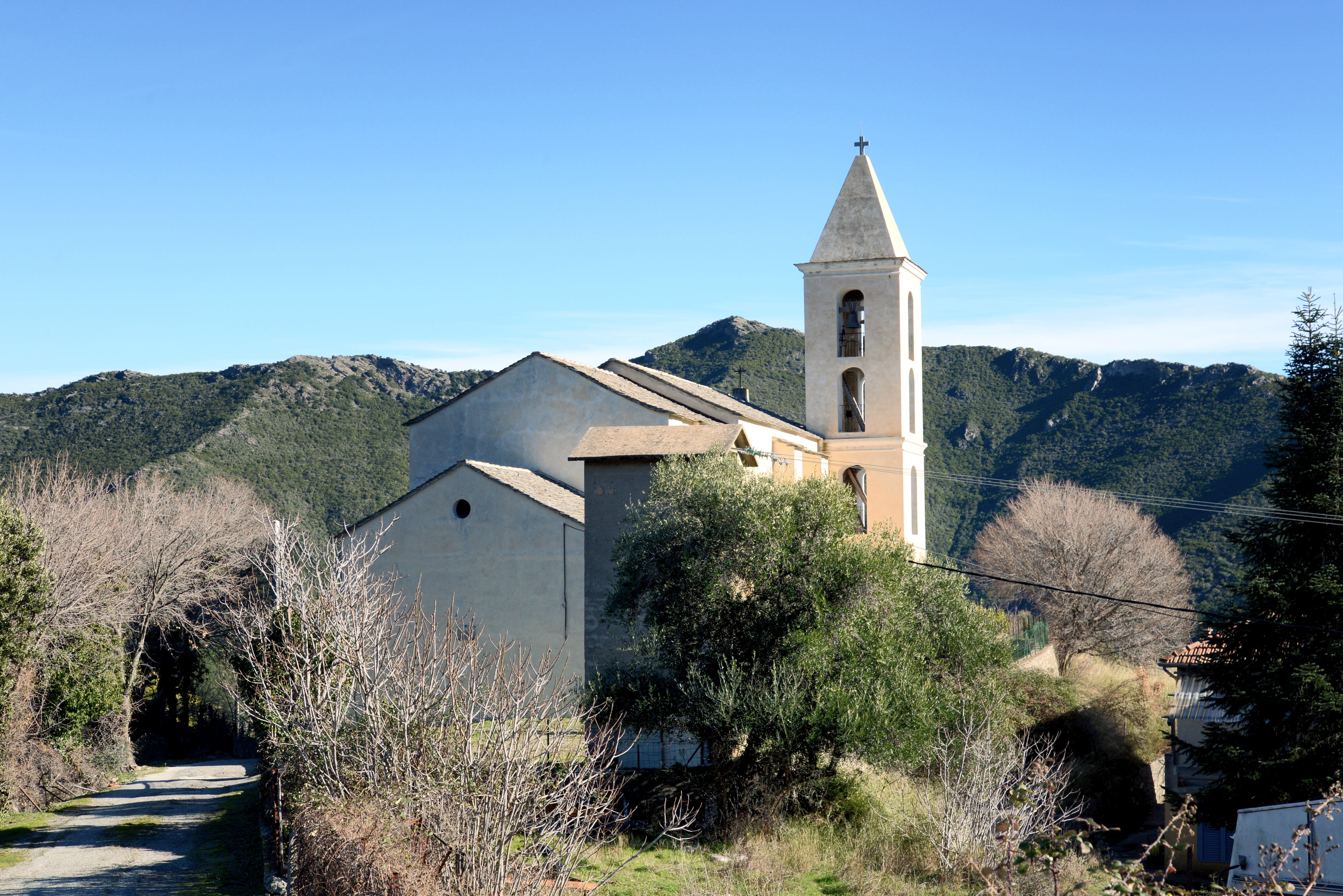 Noceta, Centre Corse - L'église paroissiale Saint-Paul